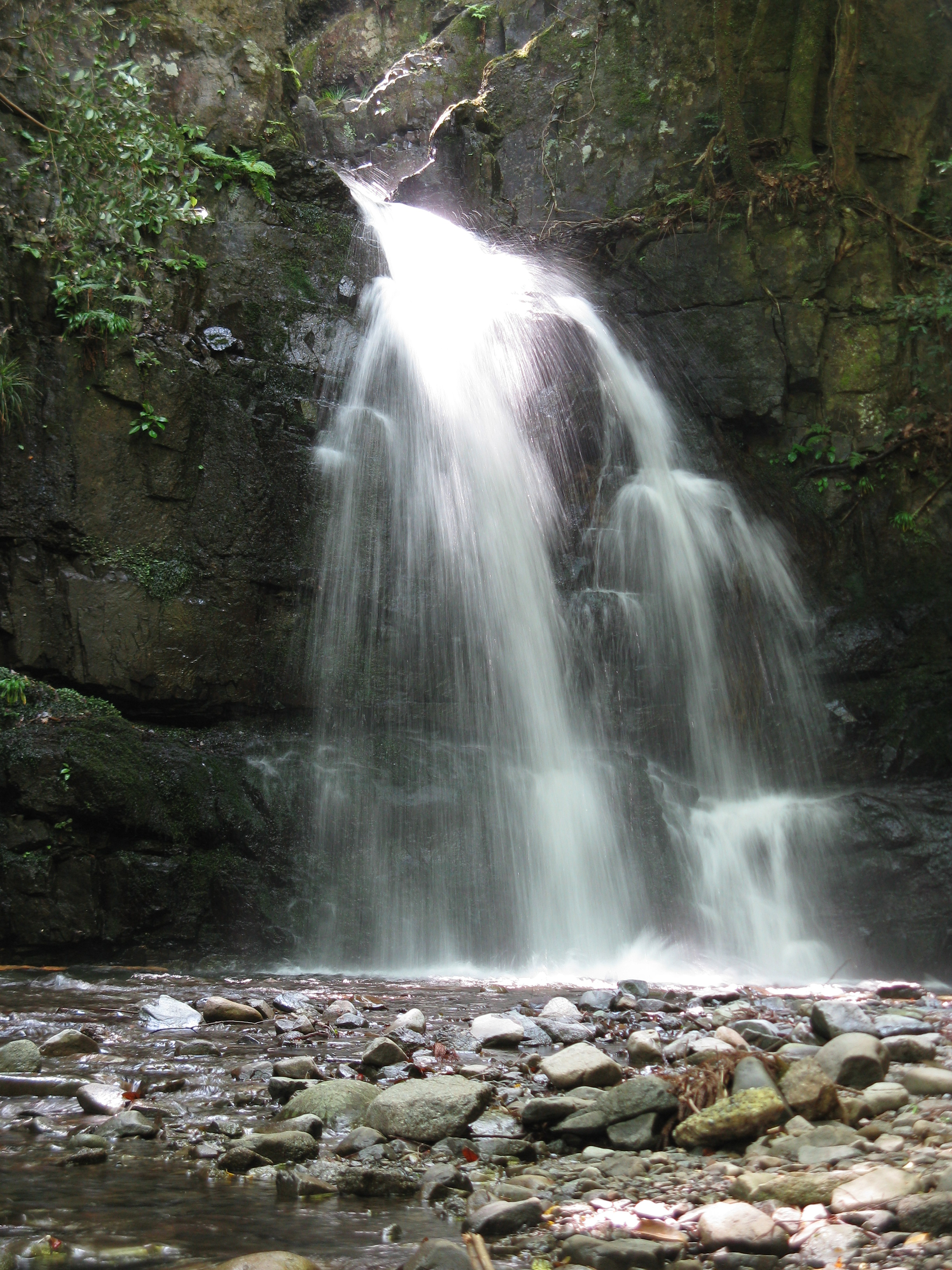 滝畑四十八滝の荒滝